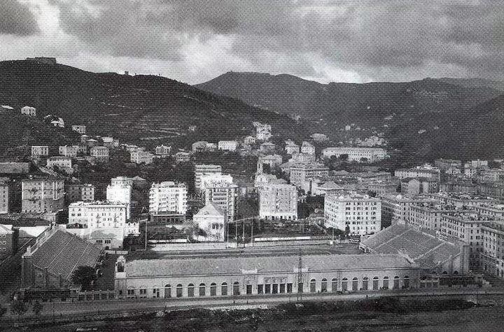 Stadio Luigi Ferraris negli anni '20-'30